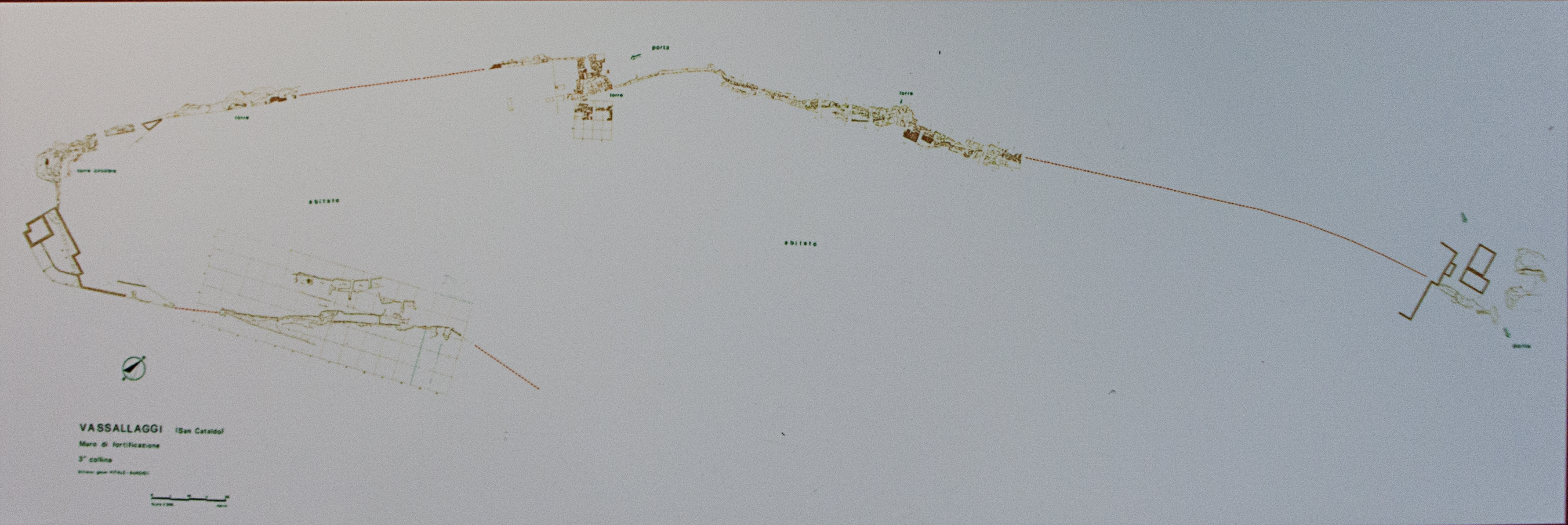 pannello del museo di Caltanissetta